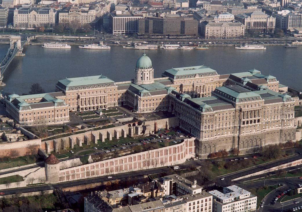 Buda Castles - Budapest - Hungary - Europe